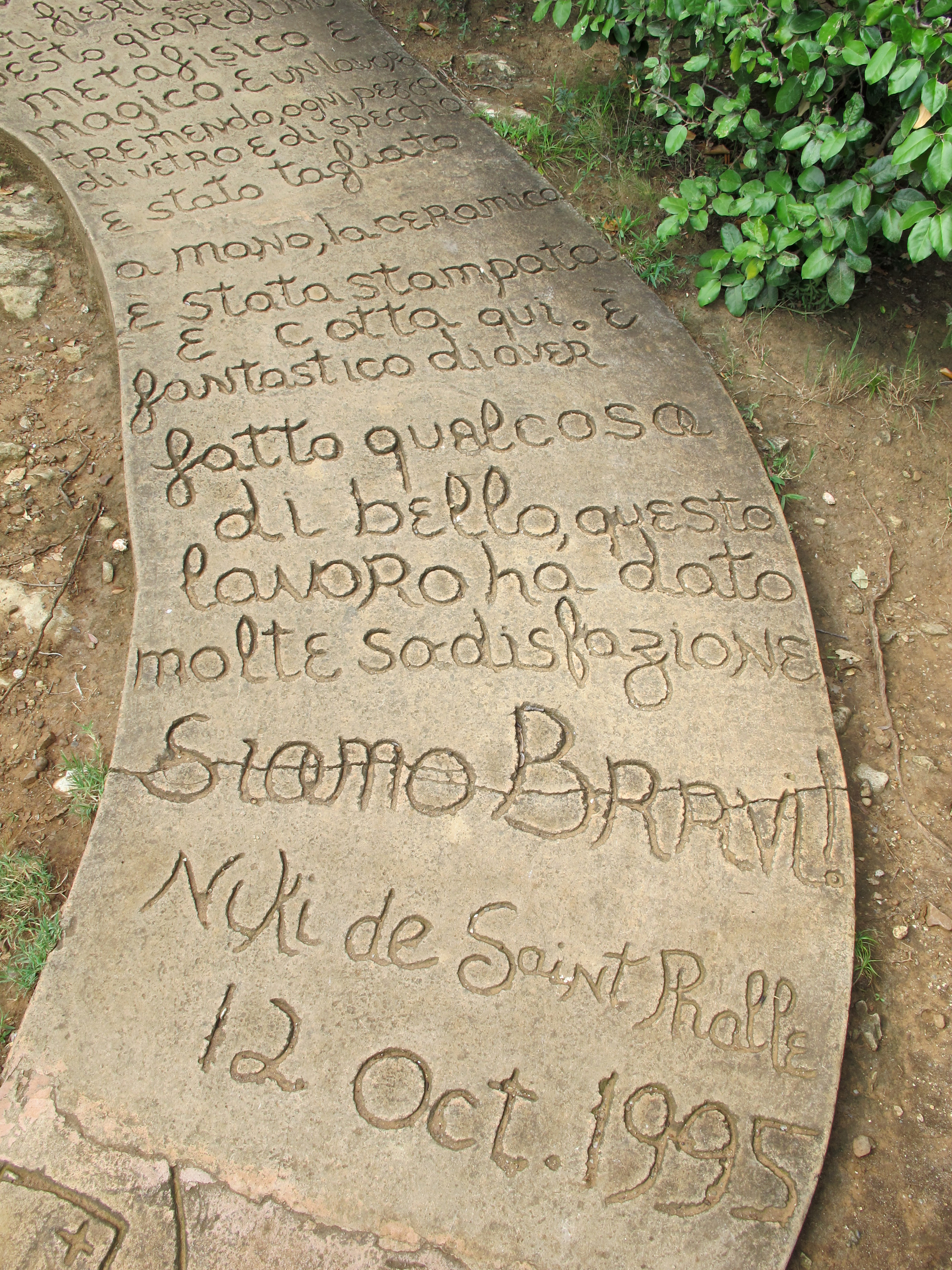 Giardino dei Tarocchi, Capalbio